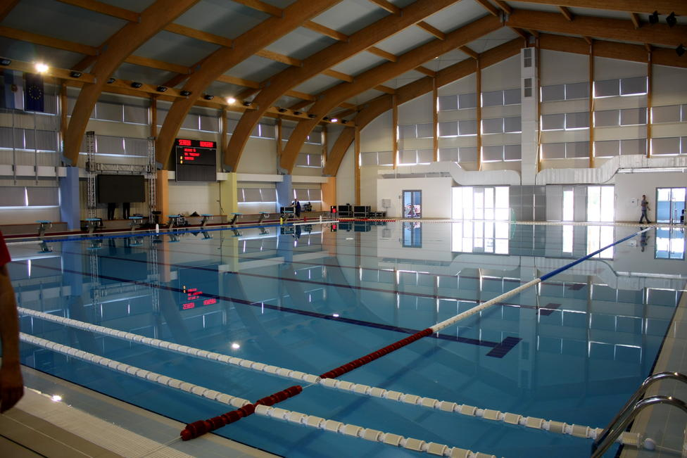 Базен Прозивка у Суботици, Србија.